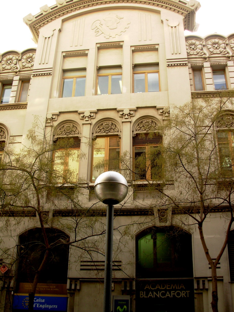 (1912) Editorial M. Seguí al Torrent de l'Olla, 9 - c/ Bonavista, 30 (Barcelona-Catalunya), que va obtenir el tercer premi al concurs anual d’edificis artístics de l’Ajuntament de Barcelona el 1912. Obra d'Andreu Audet i Puig